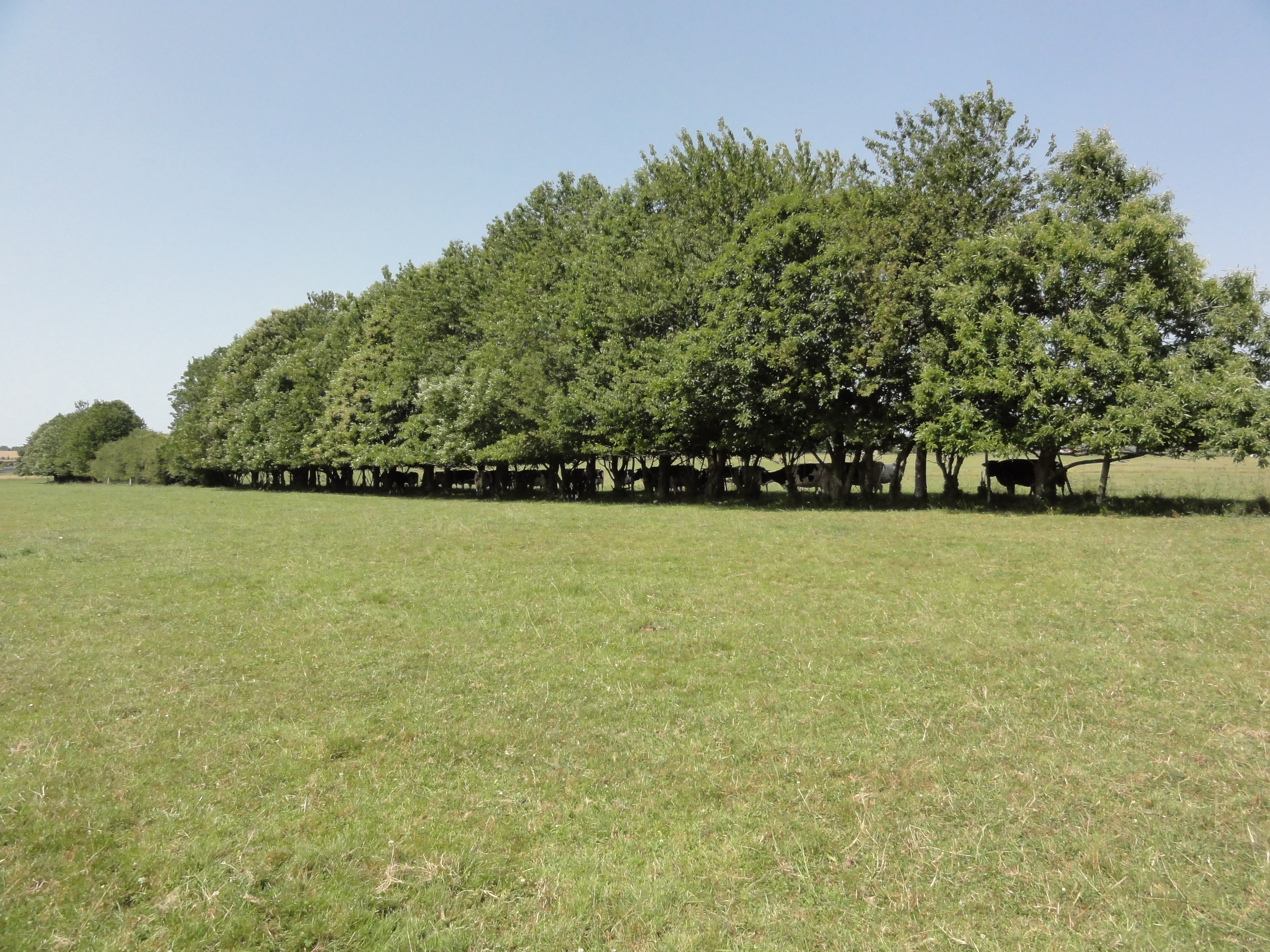 Thiergeville (Seine-Mar.) paysage avec vaches s'abritant du soleil